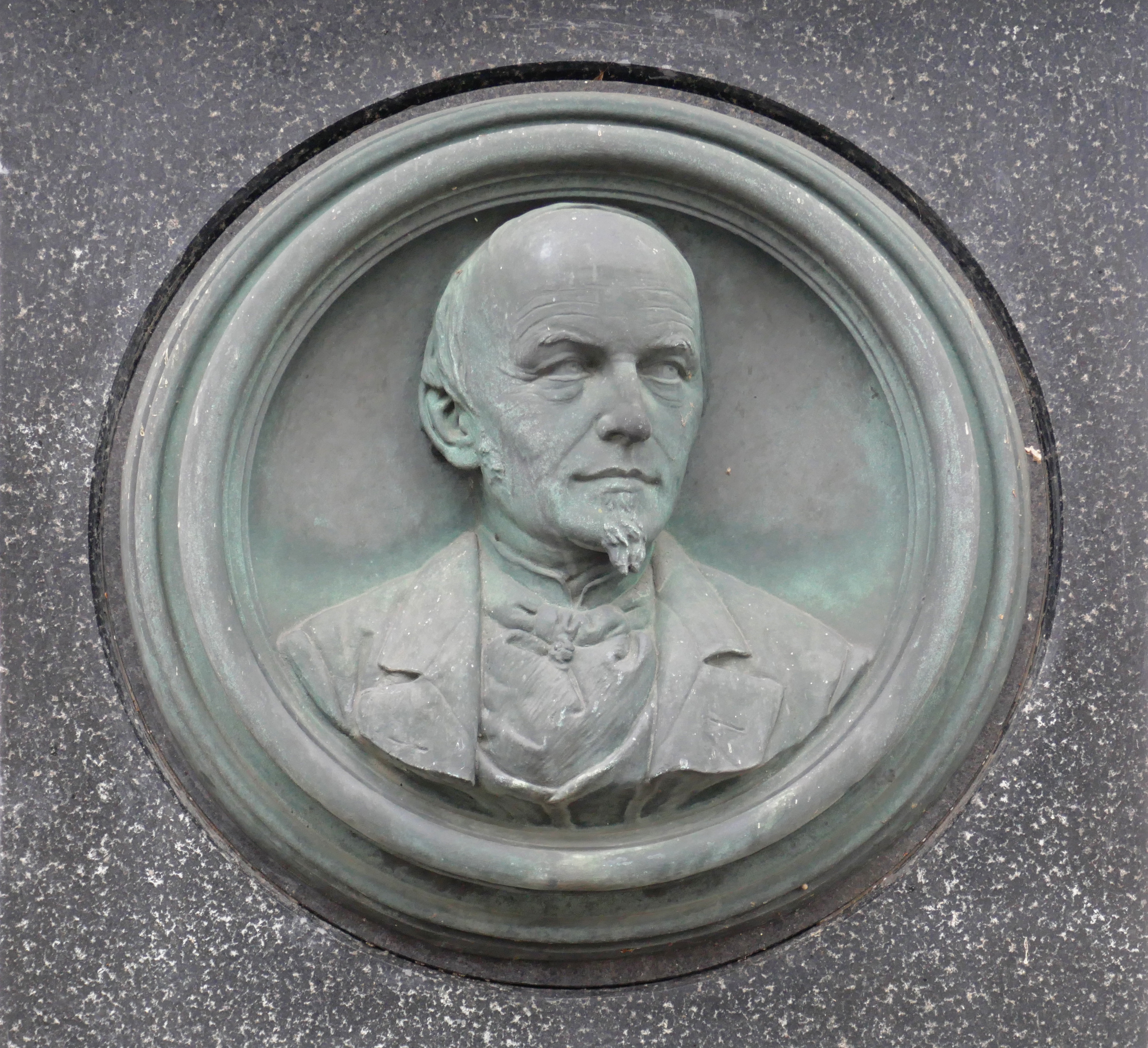 Denkmal für Ferdinand Adolph Lange in Glashütte im Osterzgebirge, Sachsen.